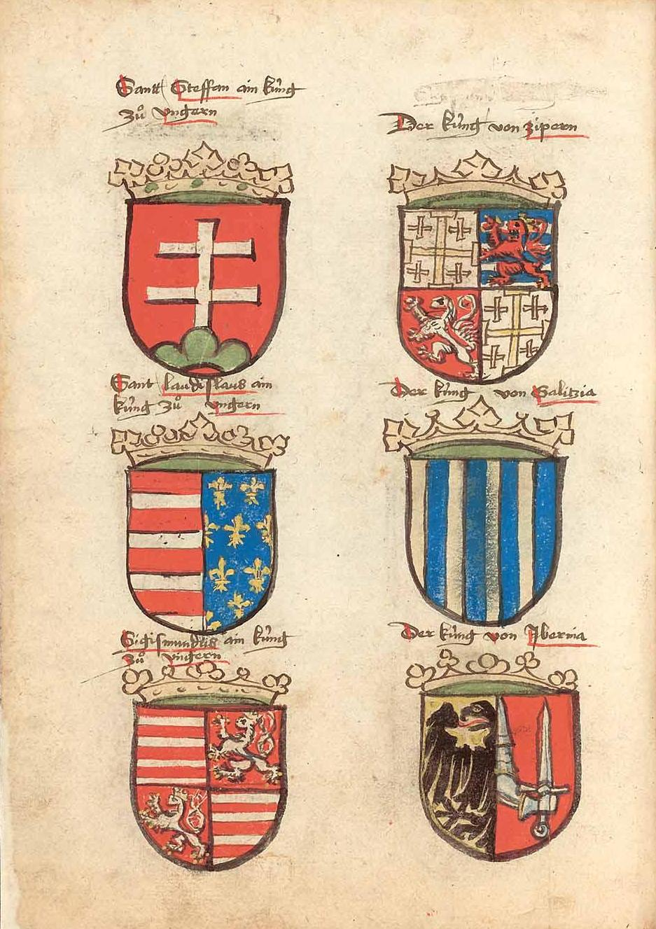 Ulrich Richental: Chronik des Konstanzer Konzils, Szent István magyar nkirály és az Anjou uralkodók címere a címerek között